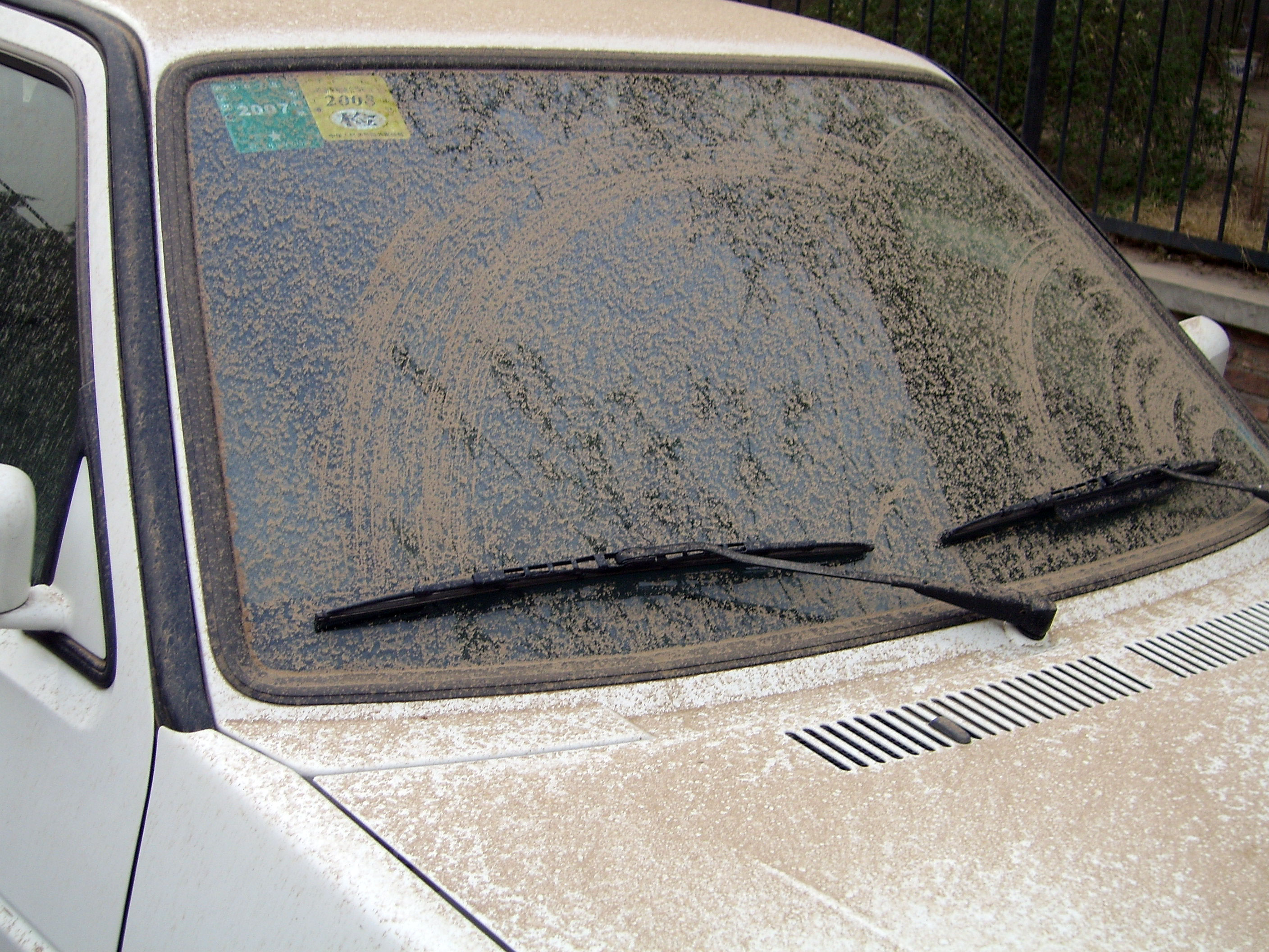 北京沙尘天气当中落满黄沙的汽车